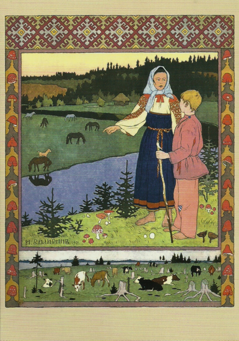 Иллюстрация к сказке «Сестрица Аленушка и братец Иванушка»